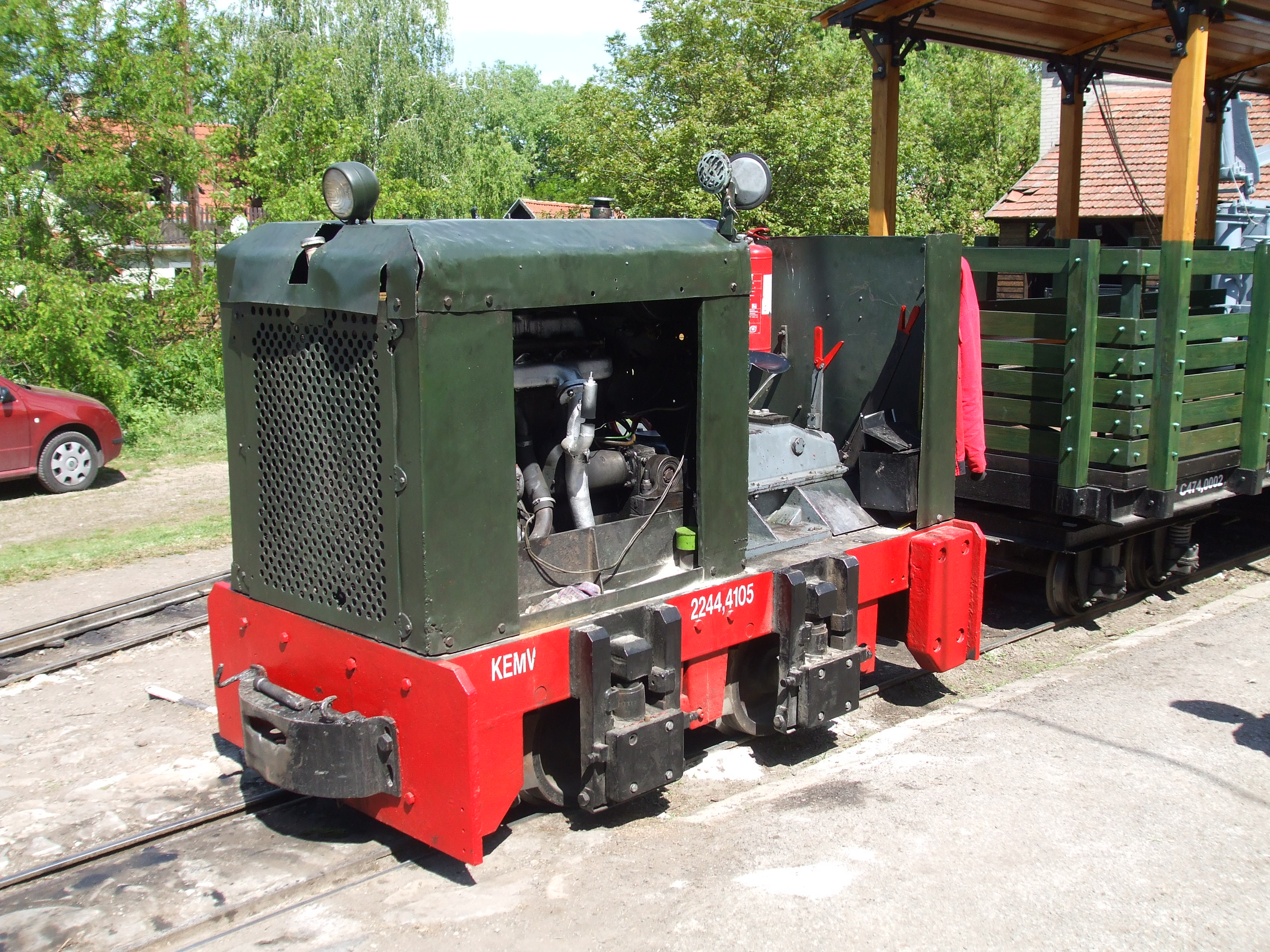 A P5-ös erdészeti pályaszámon futó (ma 2244,4105) MD–40-es típusú dízelmozdony Kemencén.